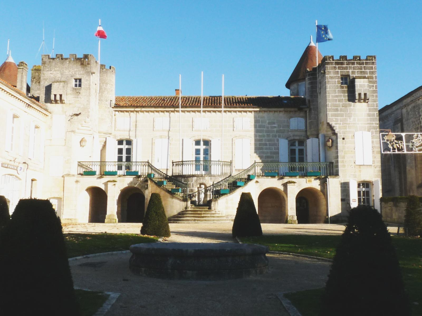 château de la Foucaudie (mairie de Nersac), Charente, France